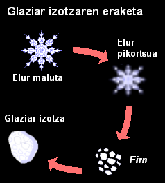 Glaziar izotzaren eraketa diagrama